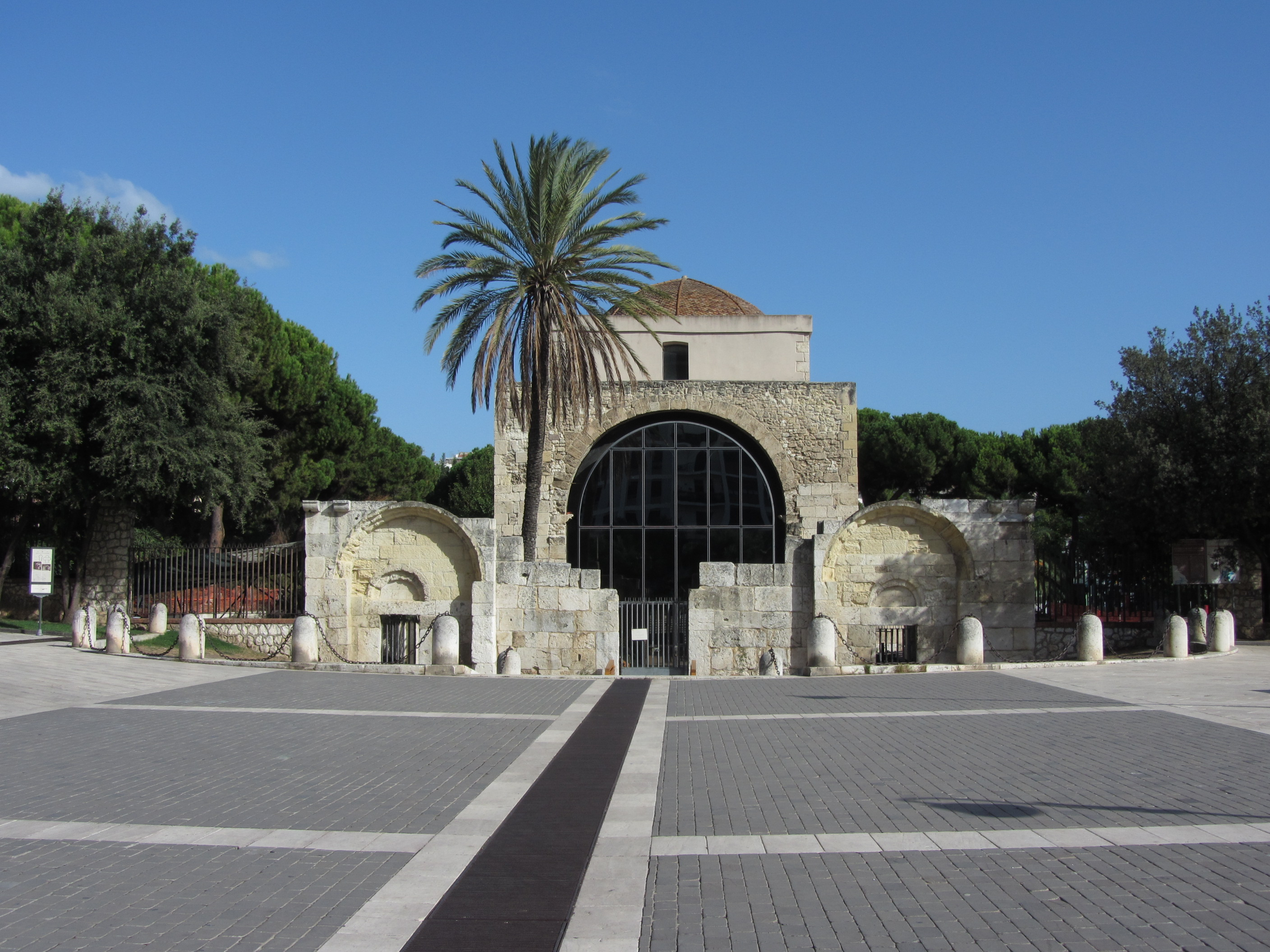 Basilica di San Saturnino - 092009546-MIBAC This is a photo of a monument which is part of cultural heritage of Italy.